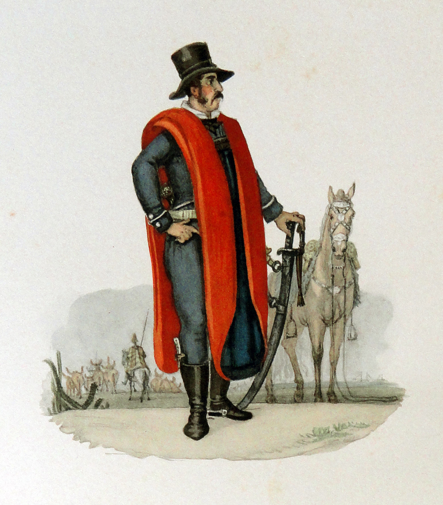 Gaúcho